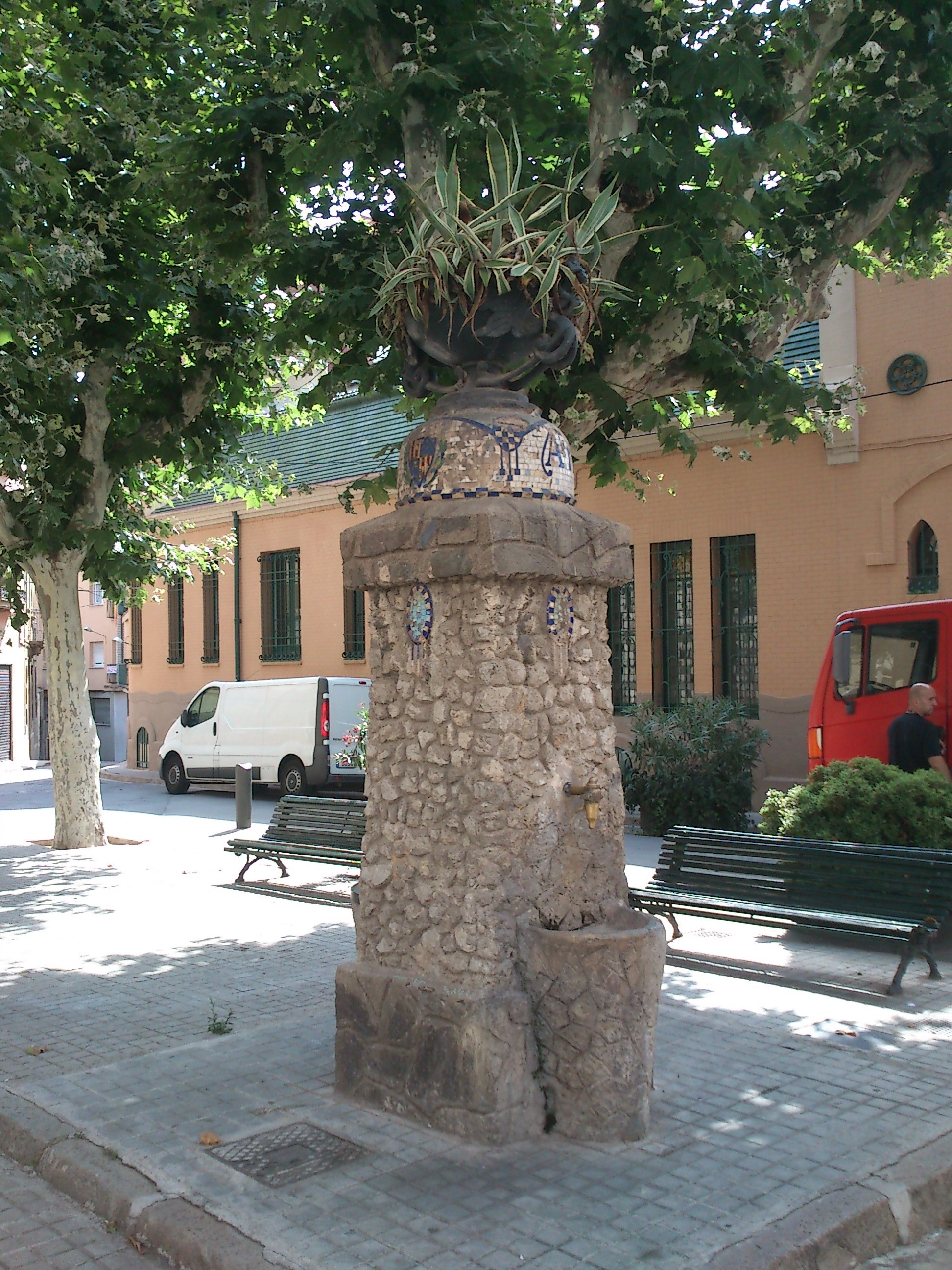 Font de la plaça Pau Casals (Dalt de la Vila, Badalona) obra de Joan Amigó i Barriga, arquitecte municipal